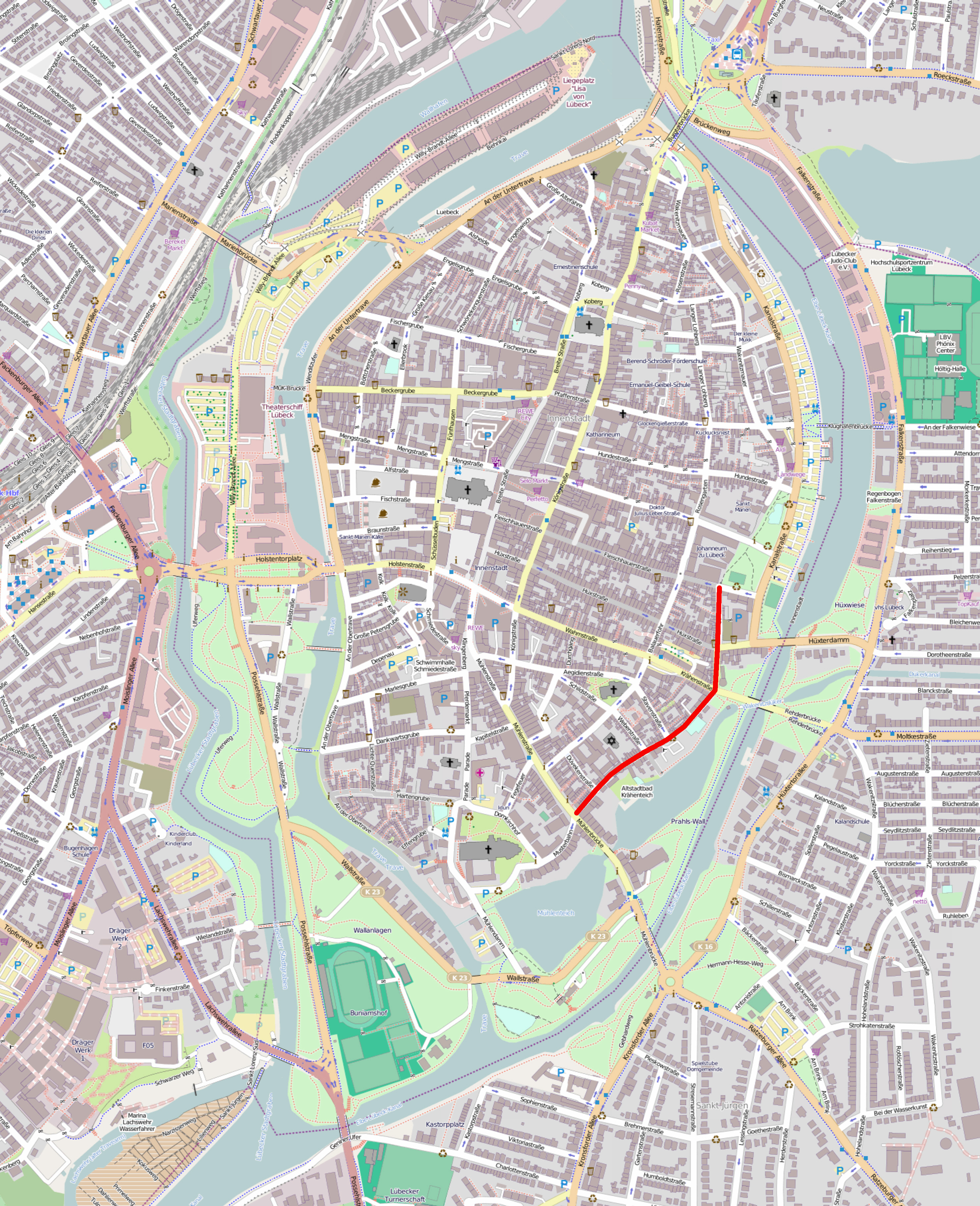 Die Straße An der Mauer in Lübeck, rot markiert auf einer OpenStreetMap-Karte